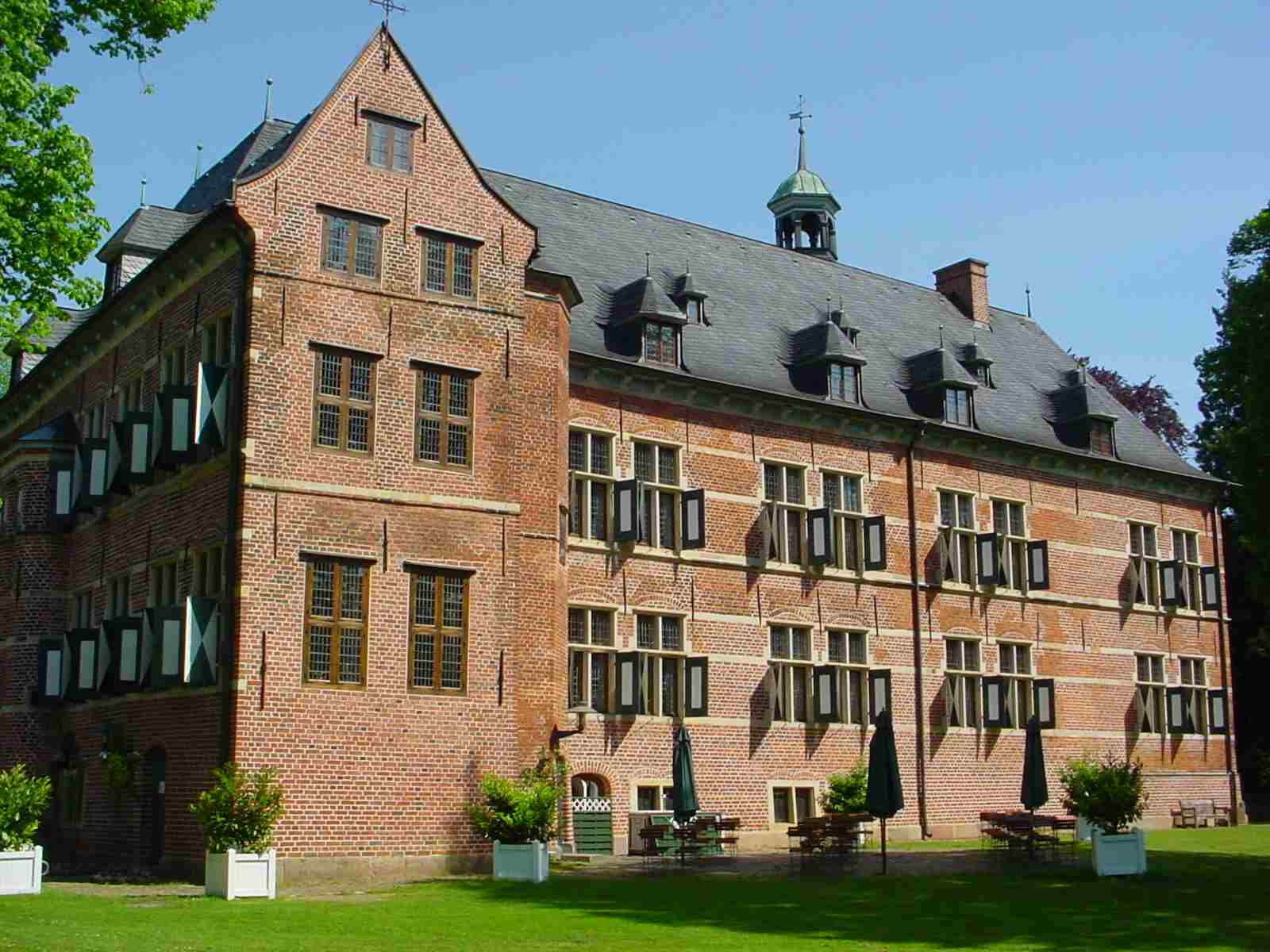 Schloss Reinbek